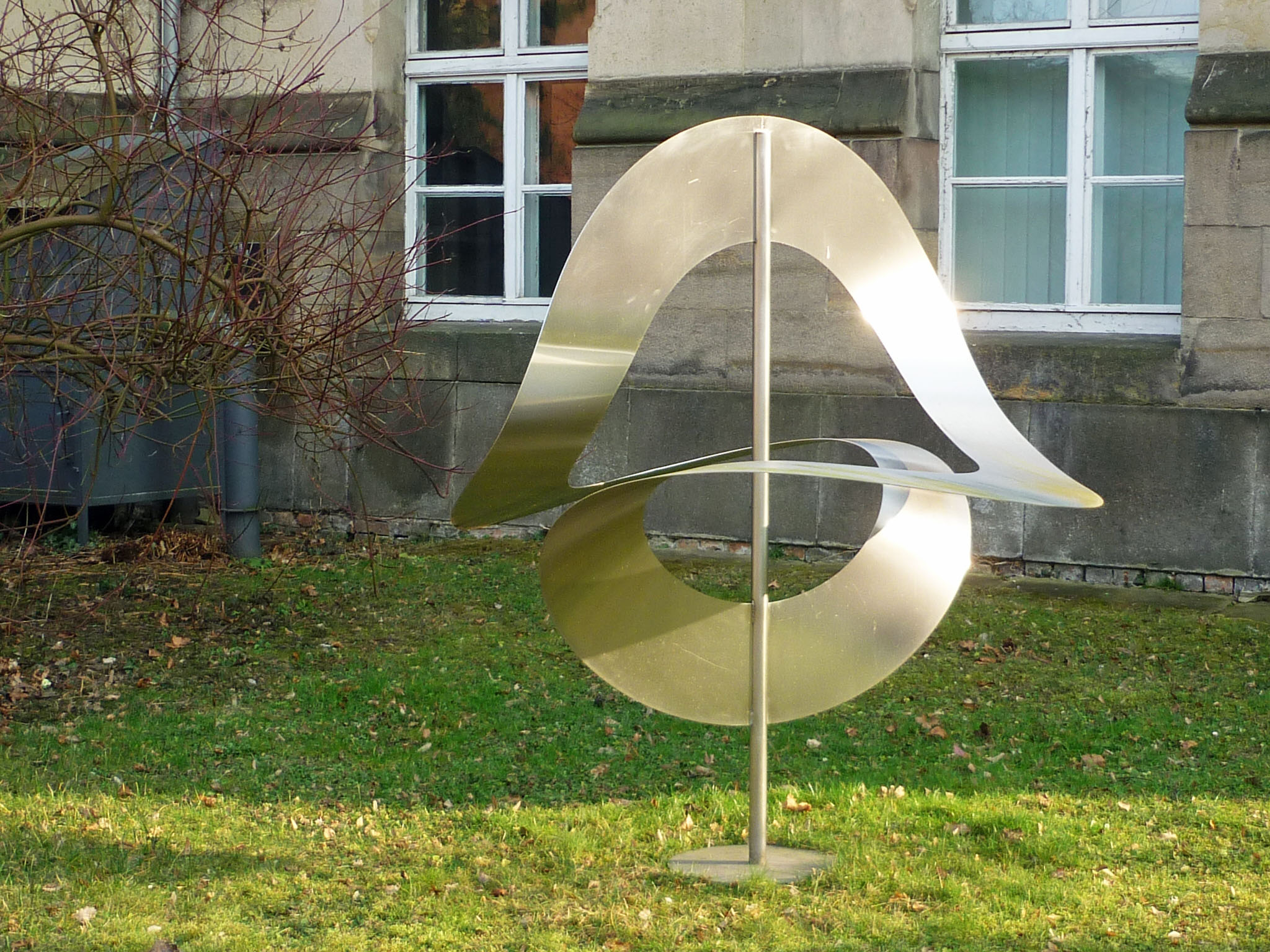 Kinetische Skulptur „Terpsichore“ (Muse des Tanzes) von Roland Phleps vor dem Görges-Bau der TU Dresden, Helmholtzstraße